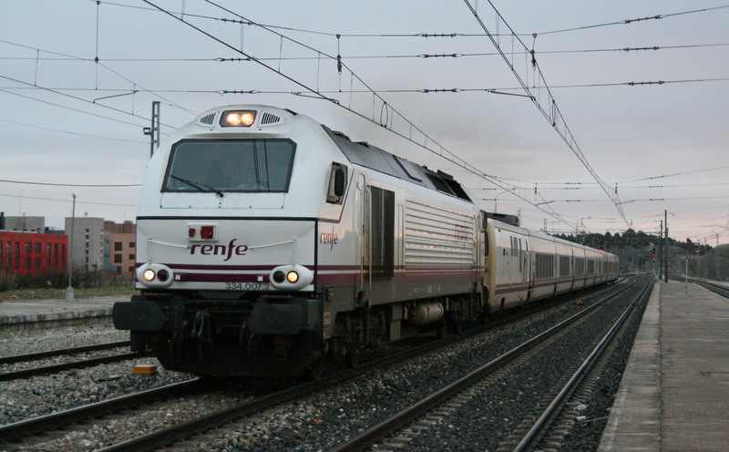 Con las primeras luces del domingo el Tren Hotel Lusitania, con la 334.007 procedente de Lisboa con Destino Madrid, a su paso por la estacion de O´Donnell